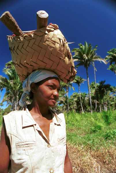 Mulheres passam dias nas florestas de côco babaçu e recolhem a matéria prima para fazerem óleo e carvão